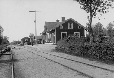 Swedish railway station Bökö, Halmstad-Bolmens Järnväg